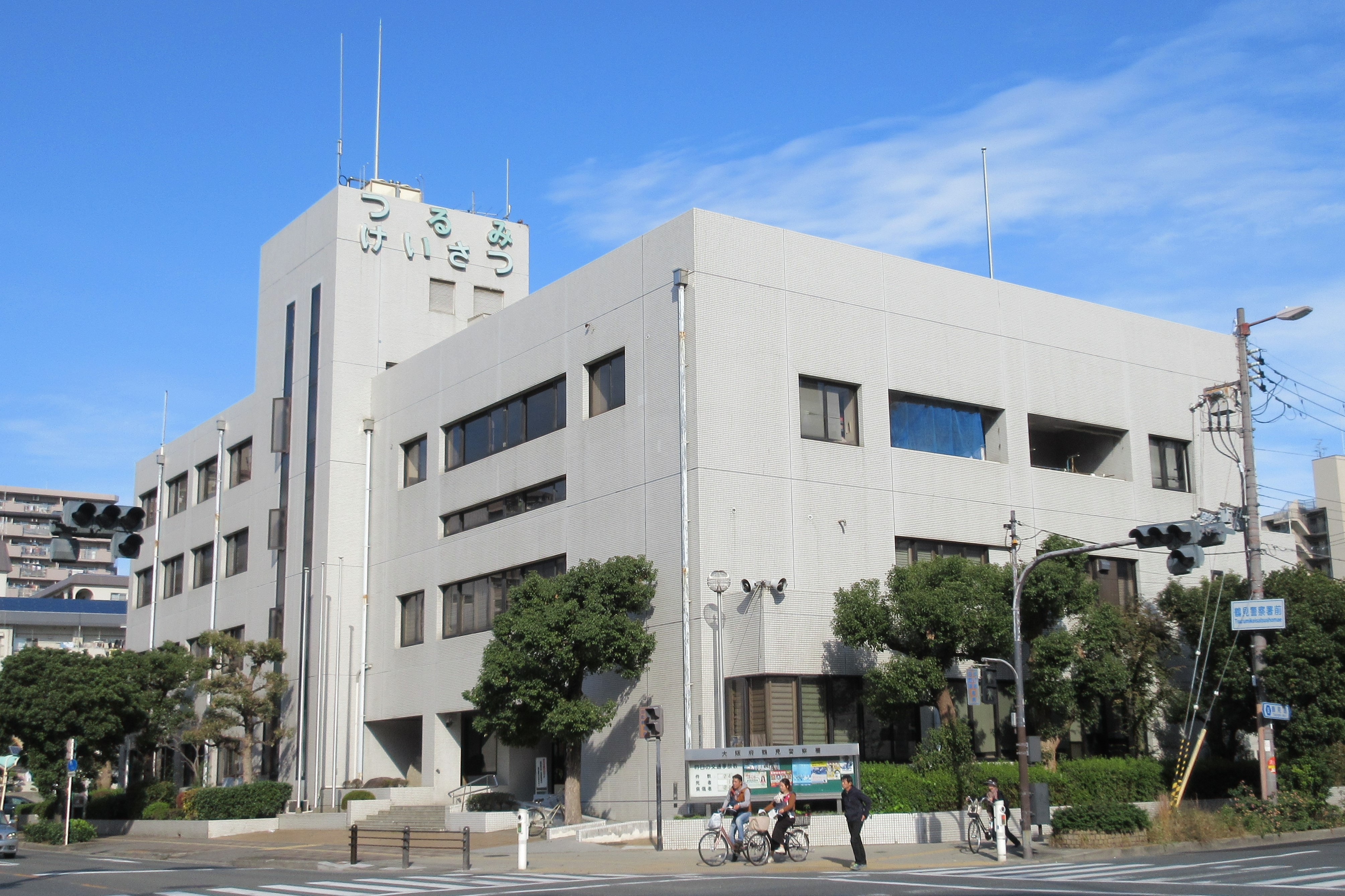 大阪府警察鶴見警察署